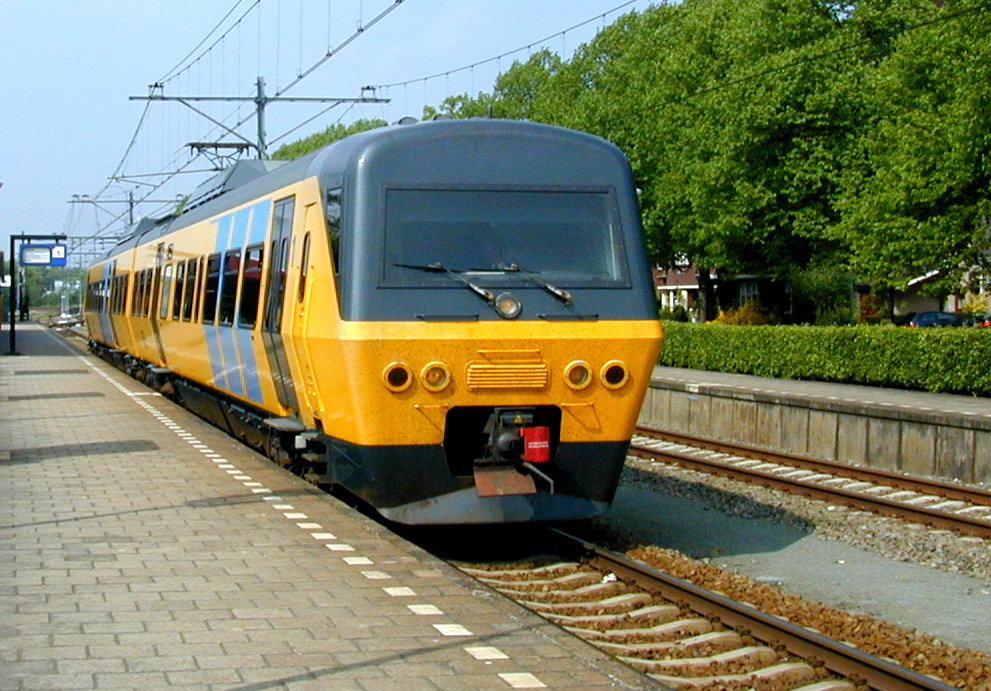 Nederlandse Spoorwegen, treinstel van het type Stoptreinmaterieel '90 te Emmen.